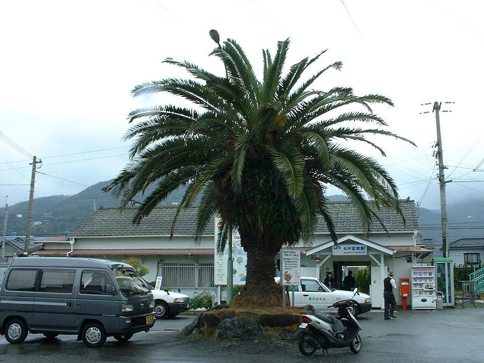 紀伊宮原駅 駅舎